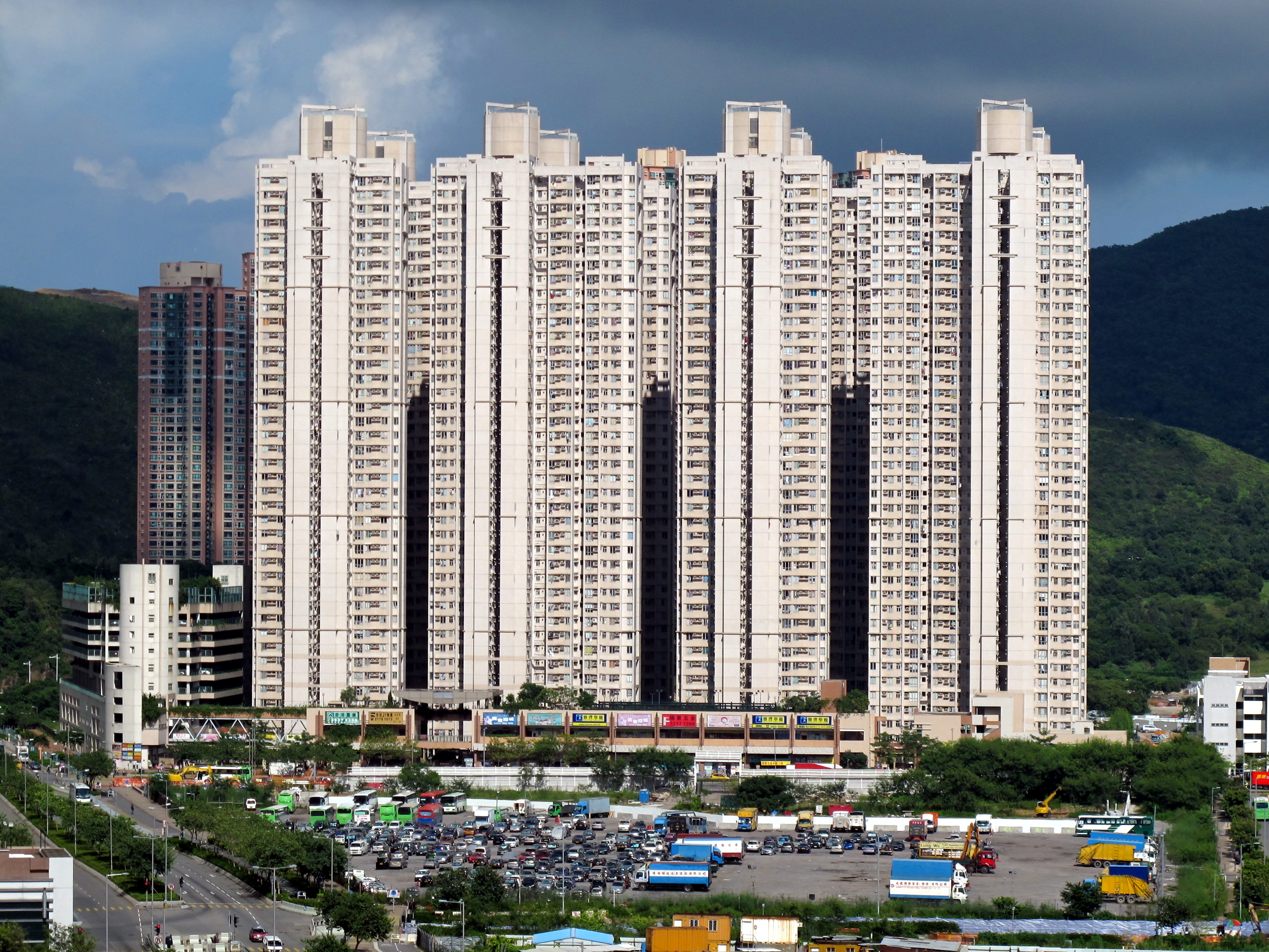 Bauhinia Garden